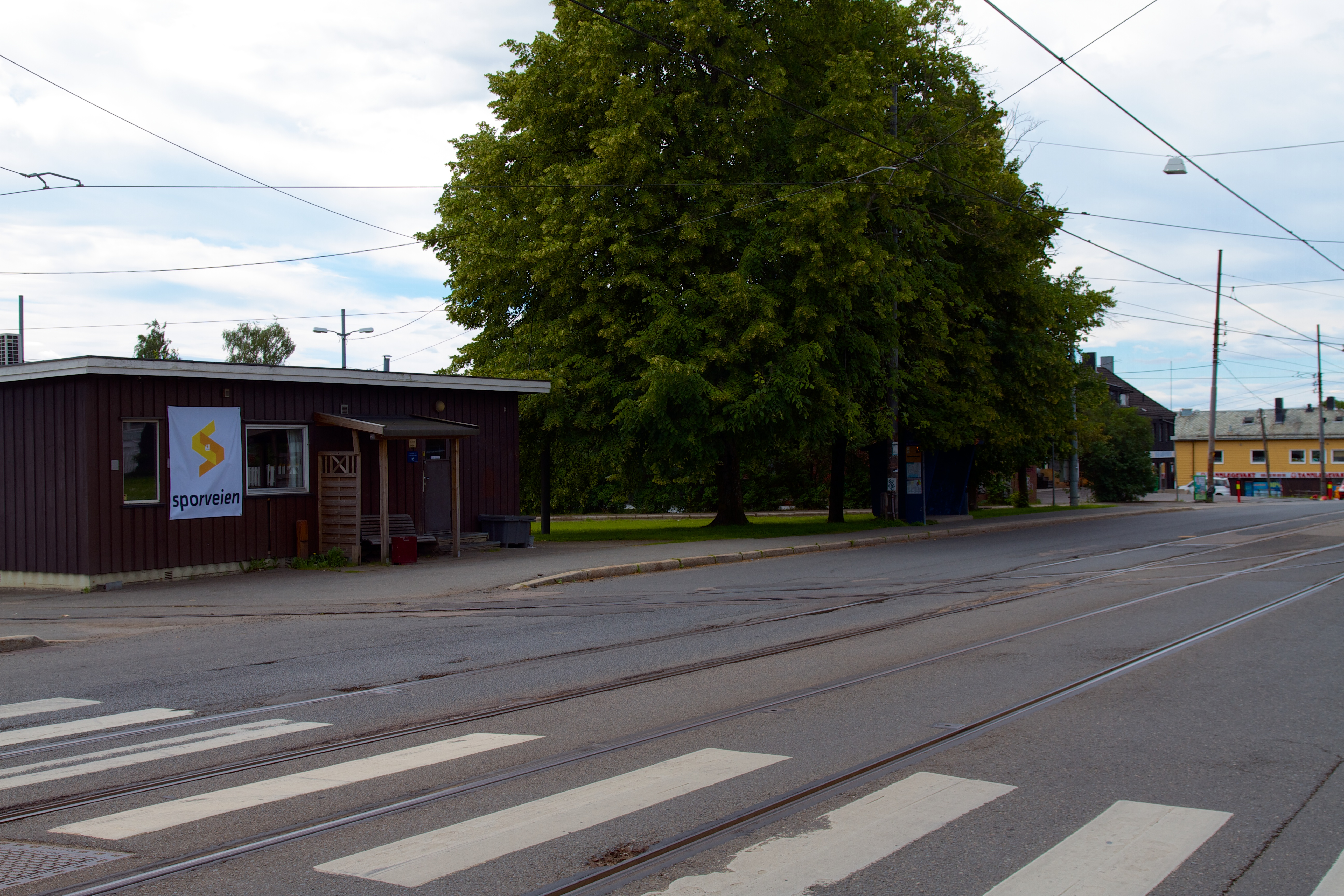 Disen holdeplass